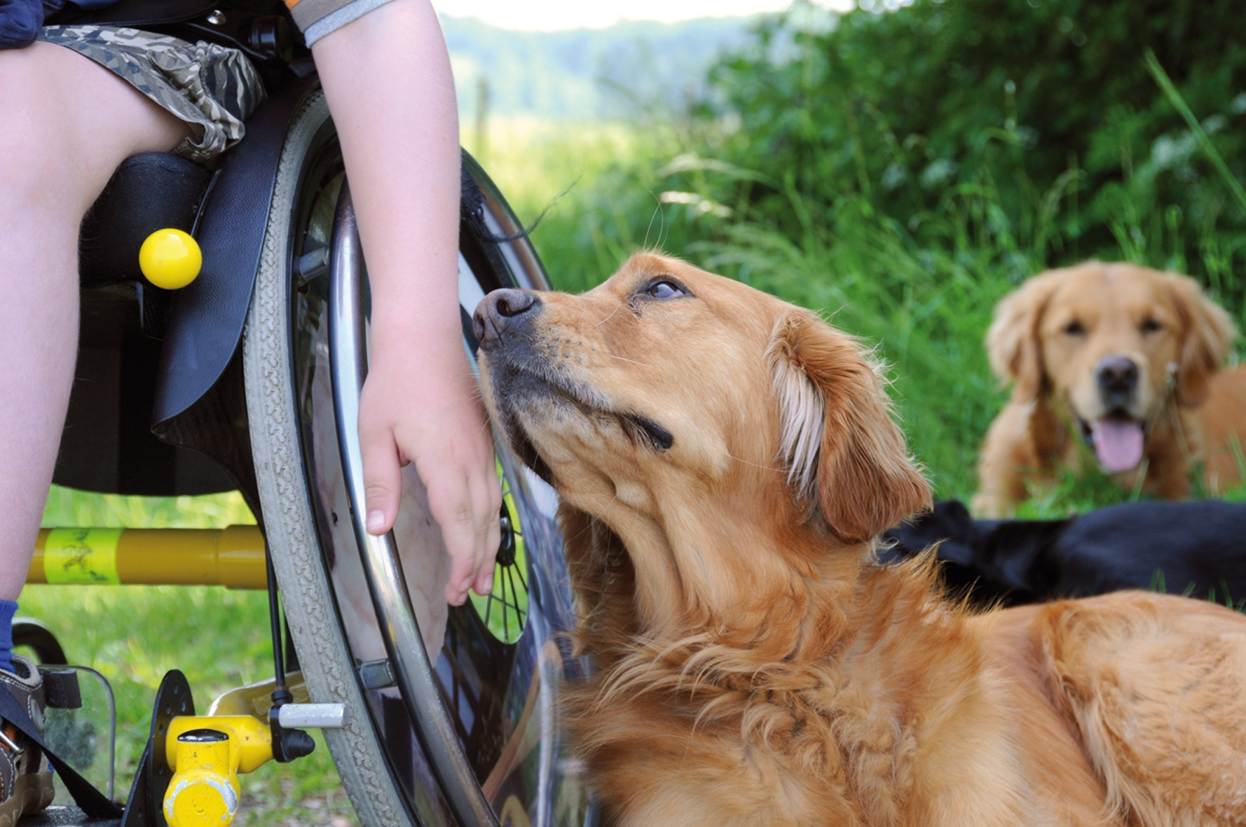 Ein Assistenzhund als Helfer und Partner.